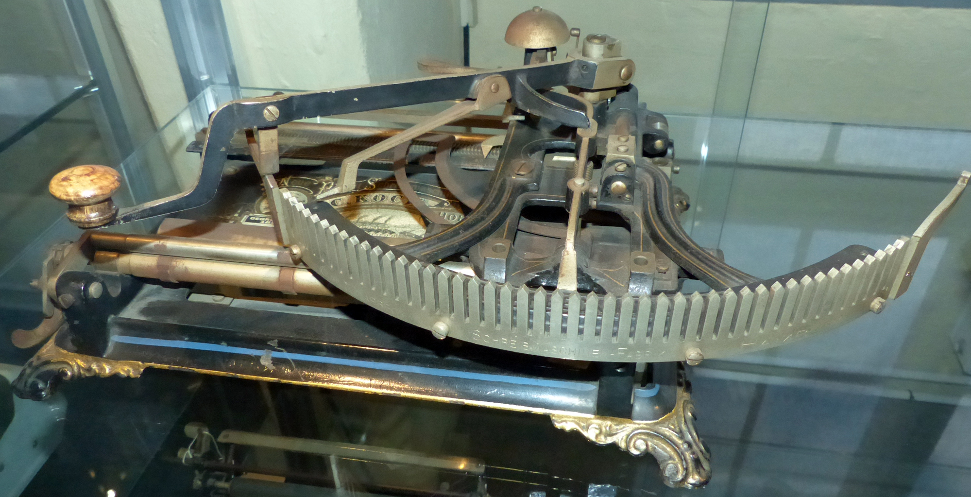 Schreibmaschine Kosmopolit, Guhl und Harbock, Hamburg, 1888; Exponat in den Technischen Sammlungen Dresden